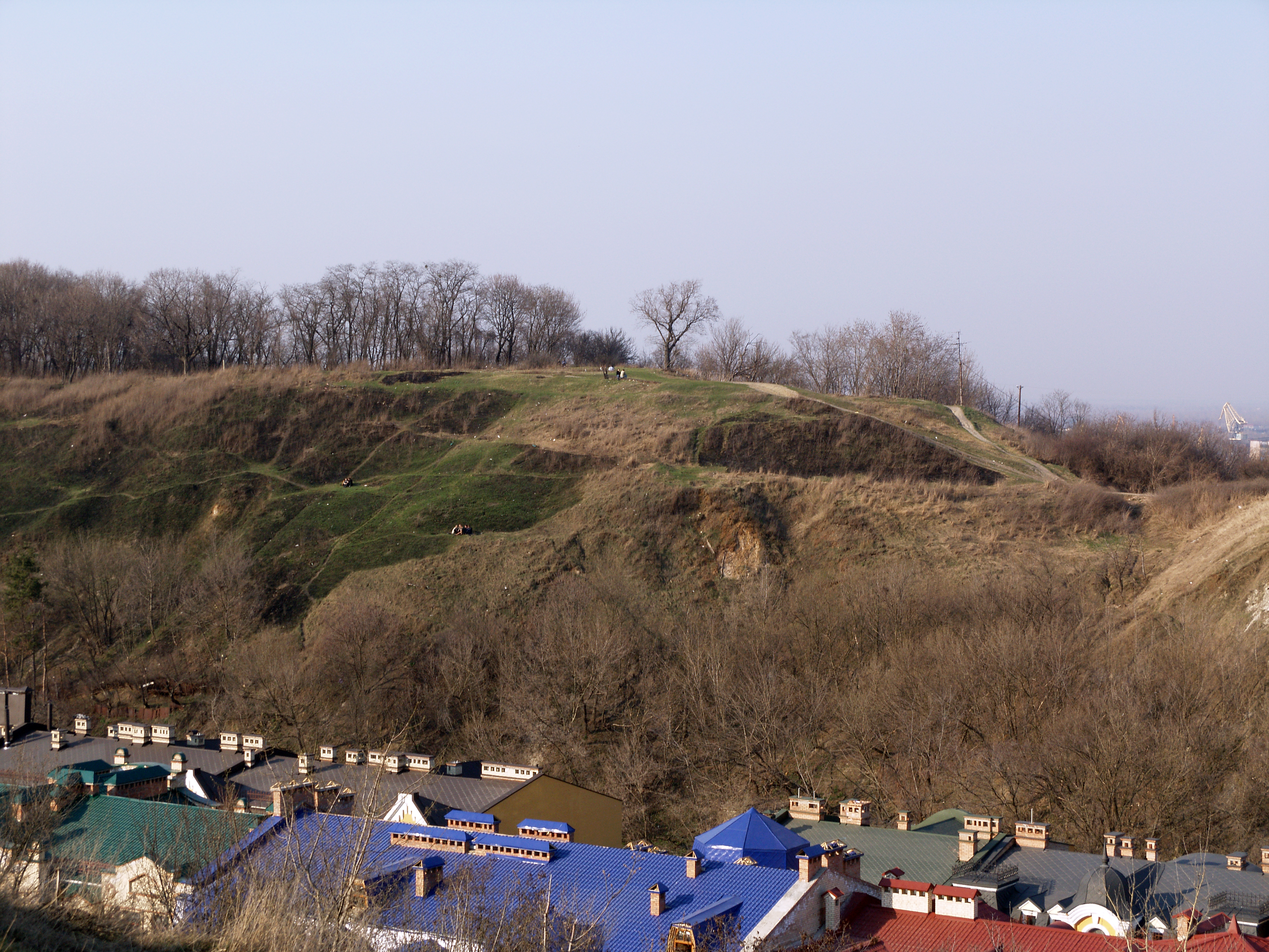 Україна, Київ - Історичний ландшафт Київських гір і долини р. Дніпра - Замкова гора